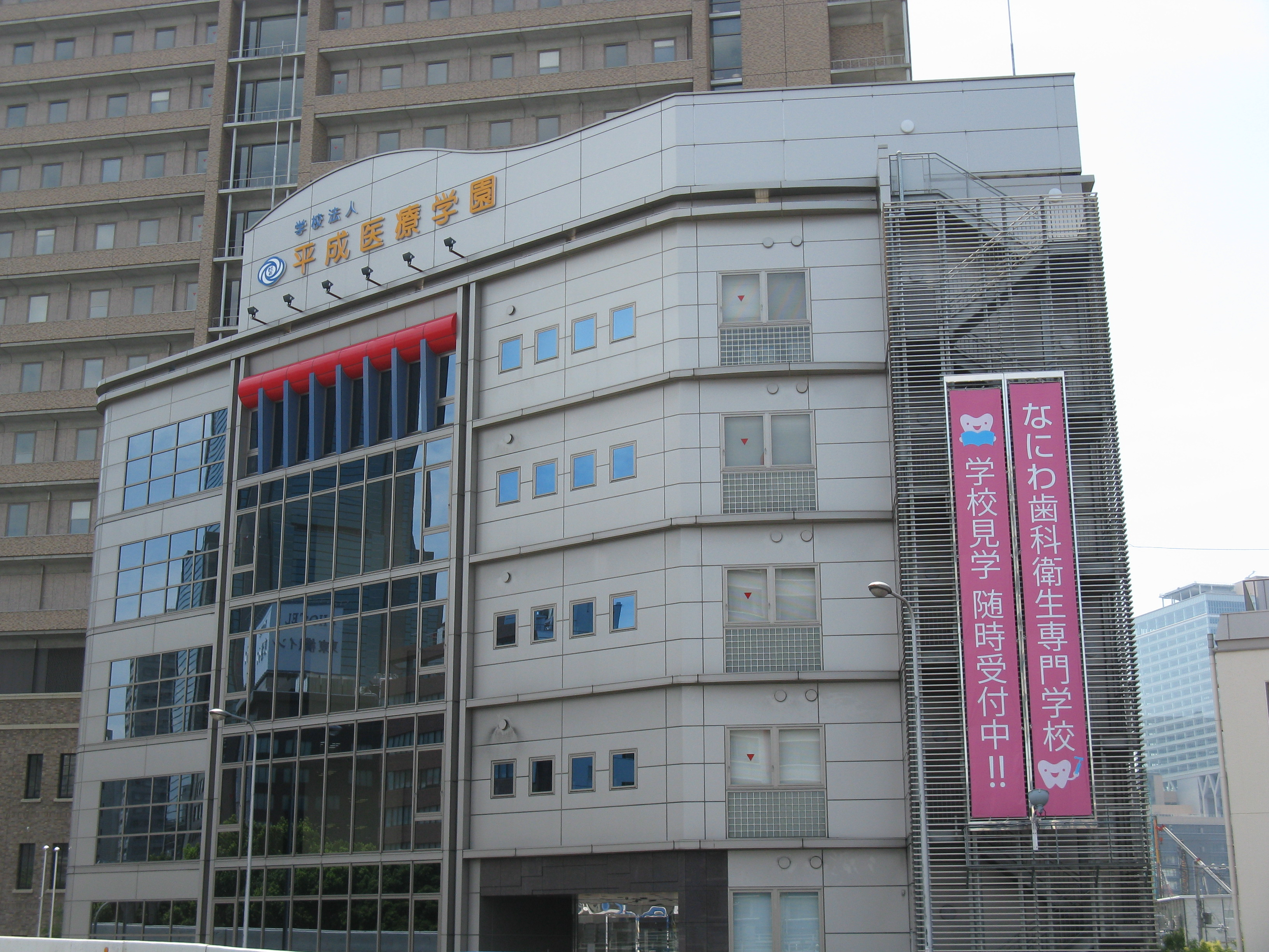 なにわ歯科衛生専門学校